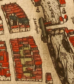 Das erste Rathaus in Emden. Ausschnitt aus Emden 1575 (Braun Hogenberg, Band II, 1. Auflage)